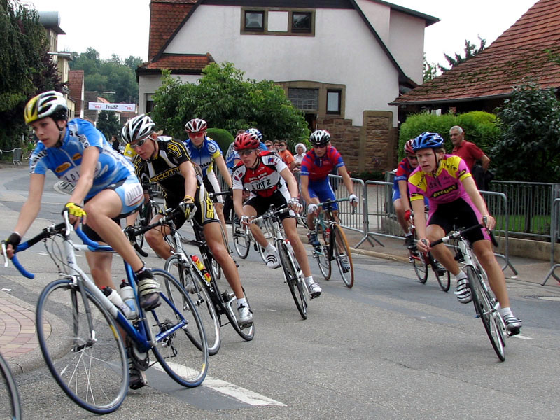 LBS-Cup Finale 2006. Rundstreckenrennen, der Jugendfahrer, über 68km. Marcel Fleschhut im Scott-Racing Team Trikot.